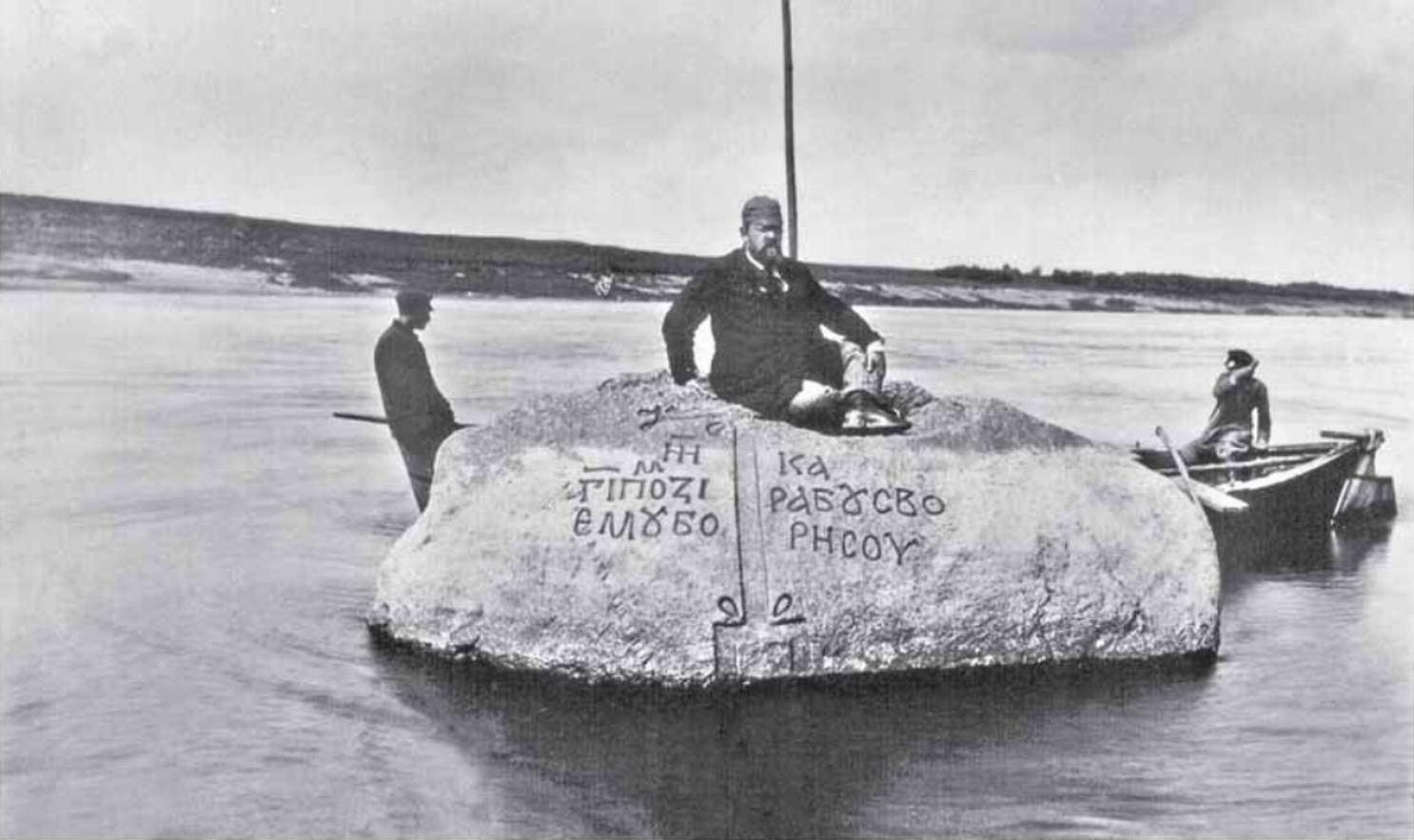 Беларуская (тарашкевіца): Дзісна (Dzisna), Барысаў камень (Barysaŭ kamień)